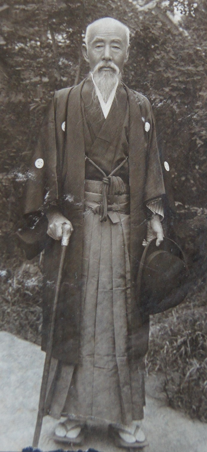 小野田セメント創始者の笠井順八。